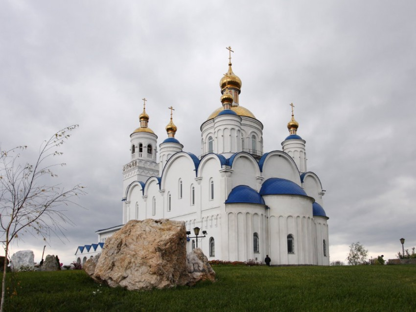 Чебаркуль. Церковь Спаса Преображения.